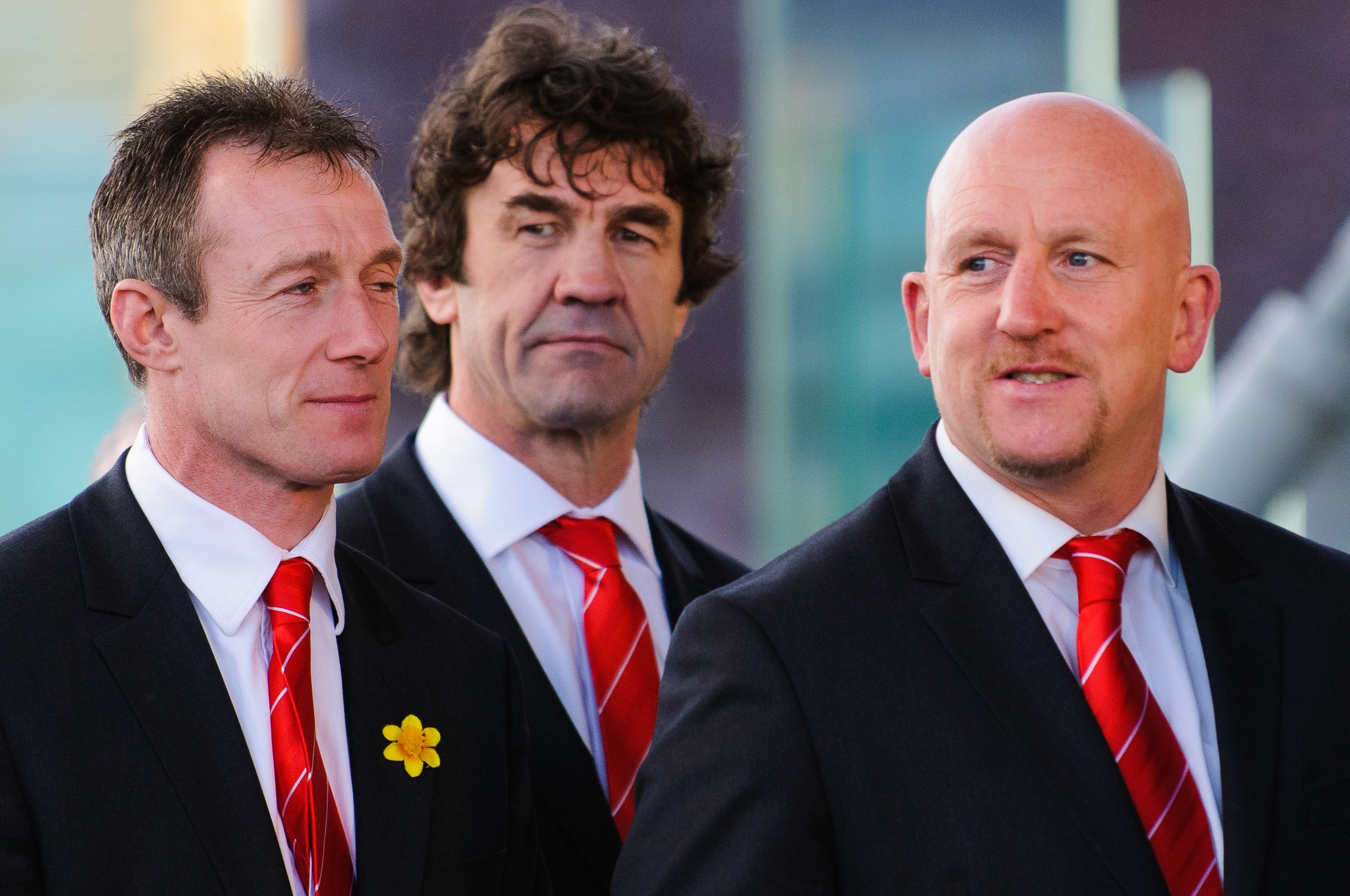 Robert Howley, Mark Davies and Sean Edwards arrive. Wales Grand Slam Celebration, Senedd 19 March 2012 / Robert Howley, Mark Davies a Sean Edwards yn cyrraedd, Dathliadau Camp Lawn Cymru, Senedd 19 Mawrth 2012